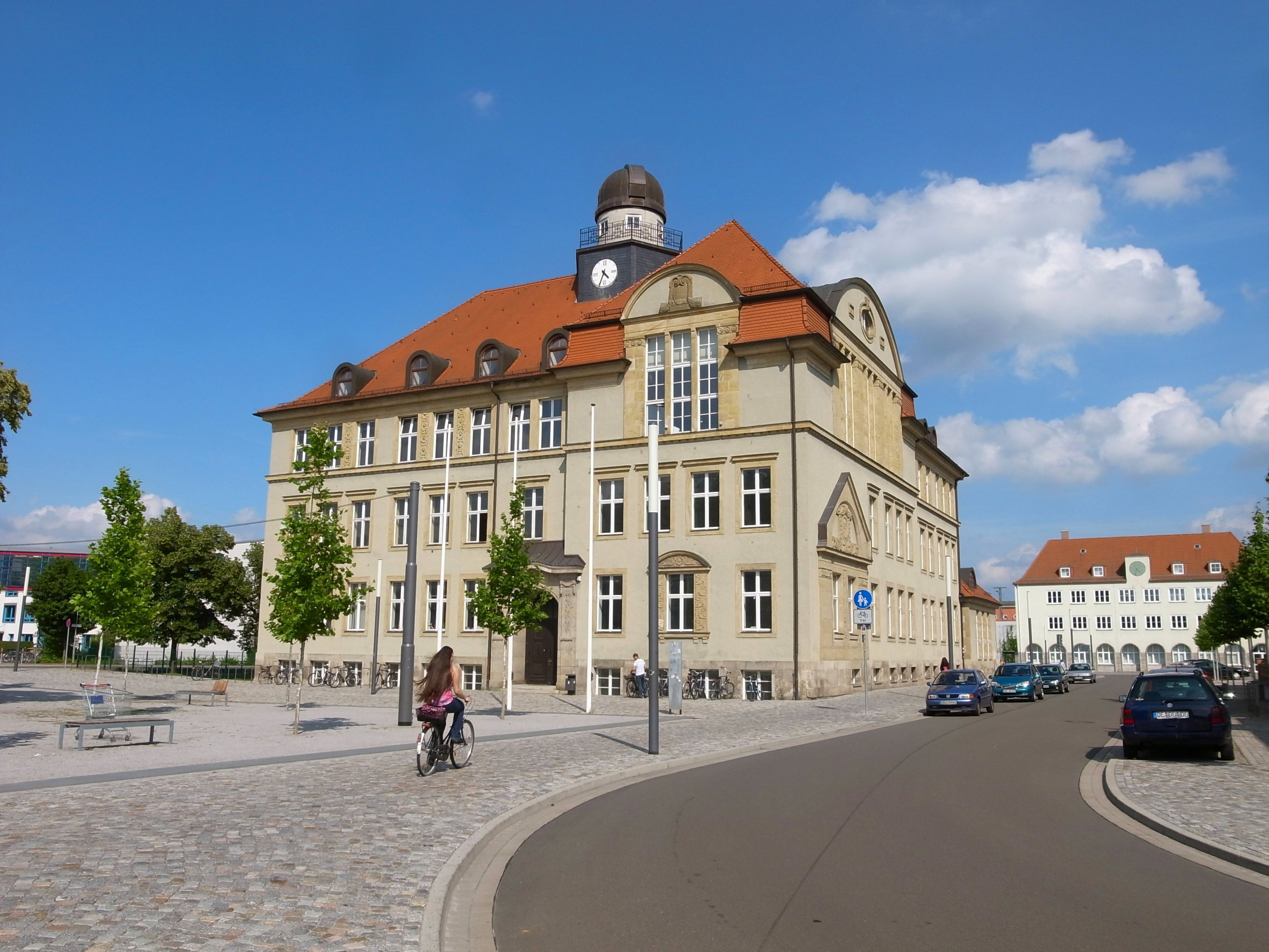 Herzogliches Ober Lyzeum, heute Seminargebäude der Hochschule Anhalt